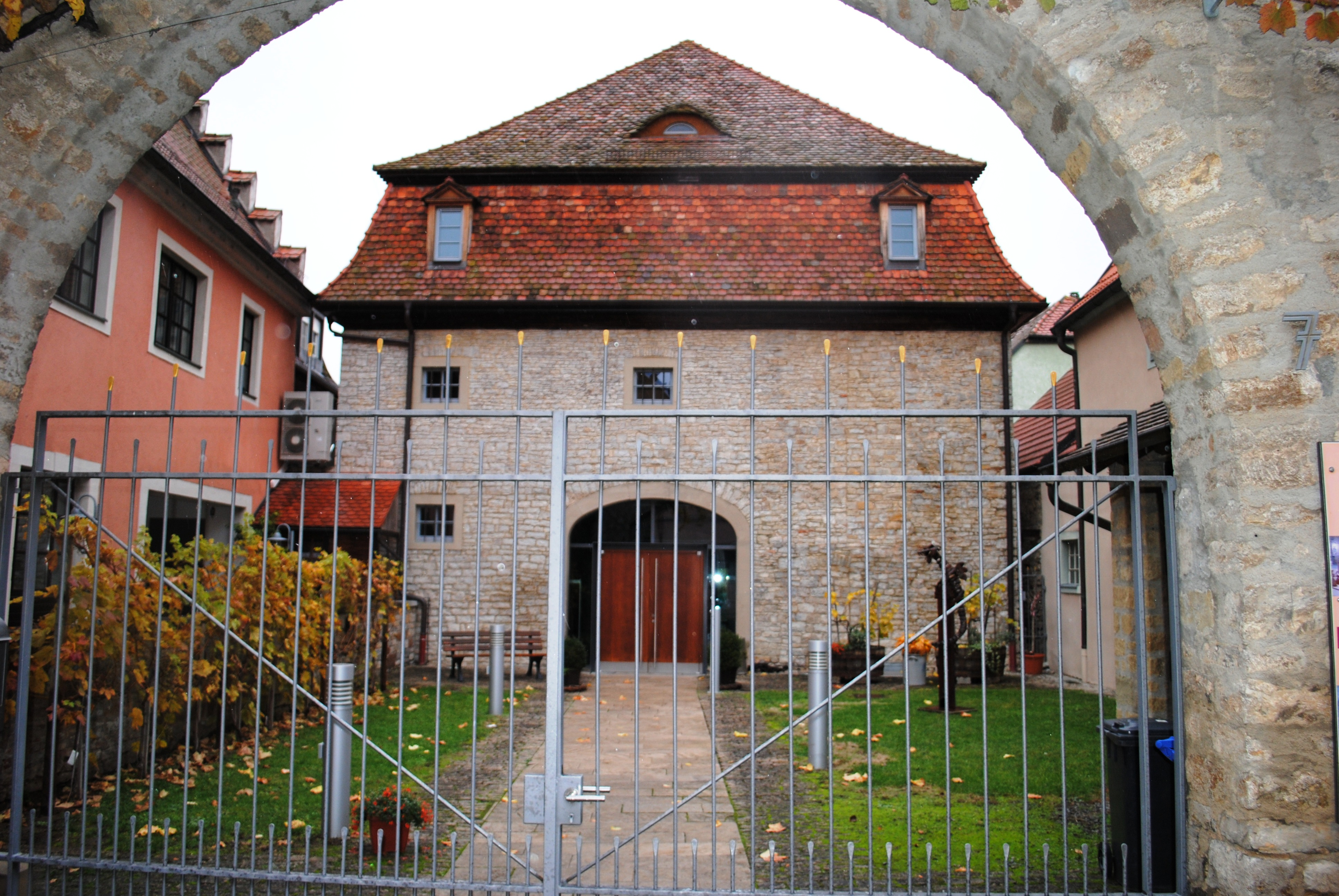 Museum Barokscheune, Weinstraße 7, Volkach, zweigeschossiger Mansarddachbau aus unverputztem Bruchsteinmauerwerk, 18. Jahrhundert; Hoftor, Rundbogentor in Bruchsteinmauerwerk; D-6-75-174-128